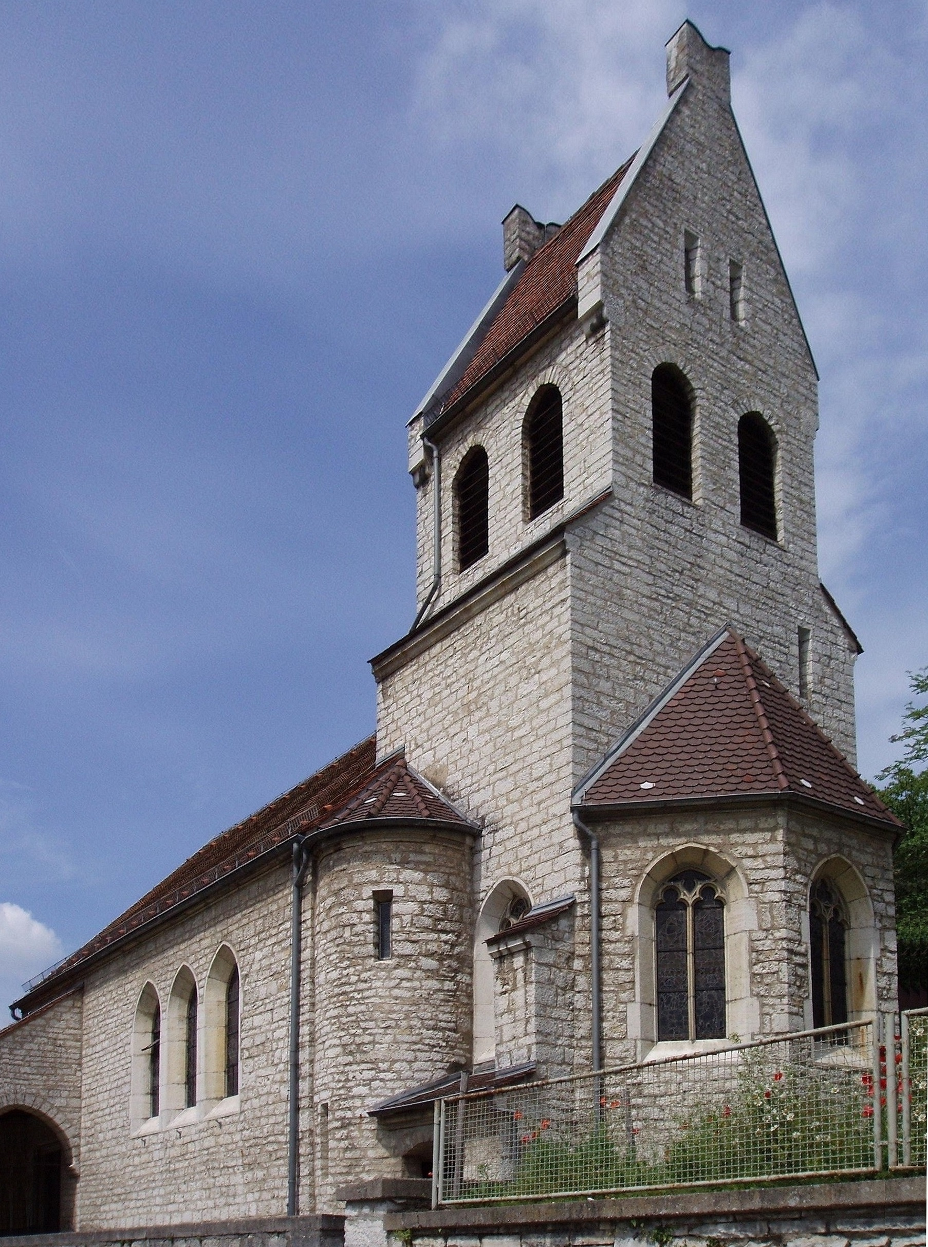 Kath. St.-Sola-Kirche, Solnhofen